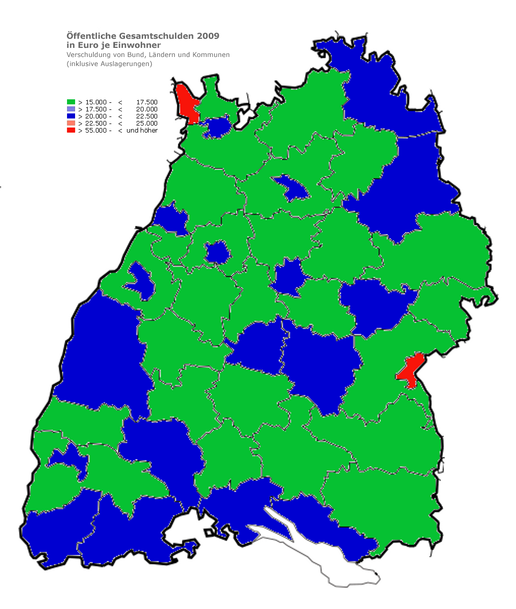 Öffentliche Schulden in Baden-Württemberg im Jahr 2009